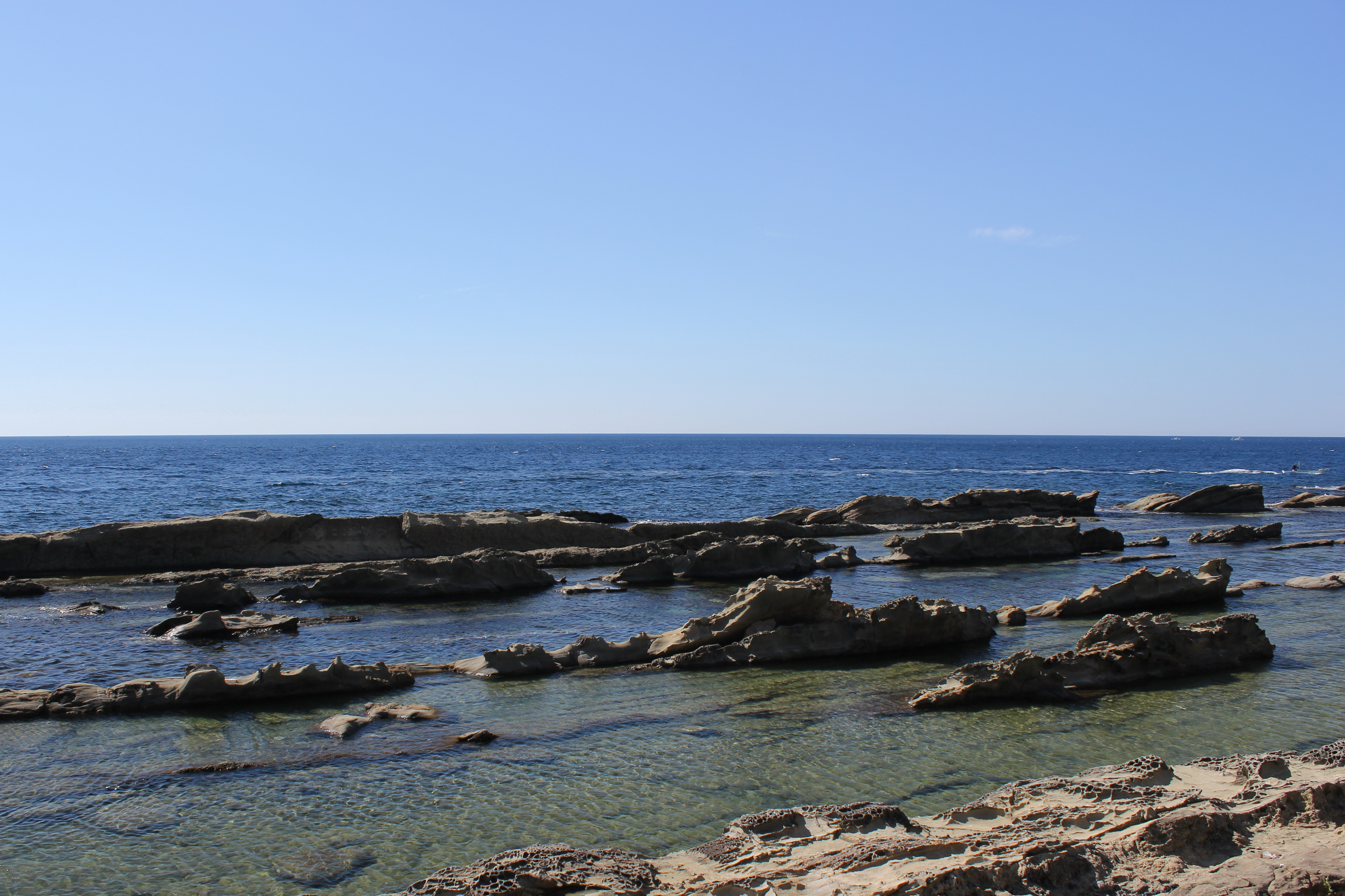 弁慶の洗濯岩